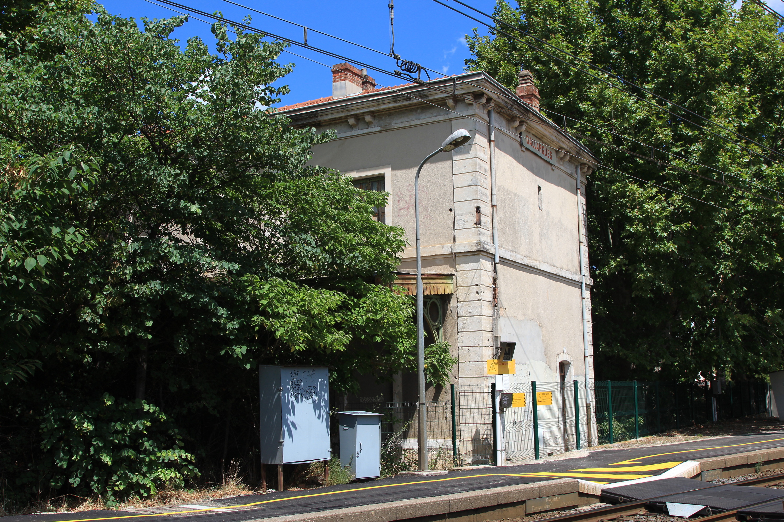 L'ancien bâtiment voyageurs de la gare de Gallargues. On apperçoie la marquise qui était perpendiculaire aux quais.